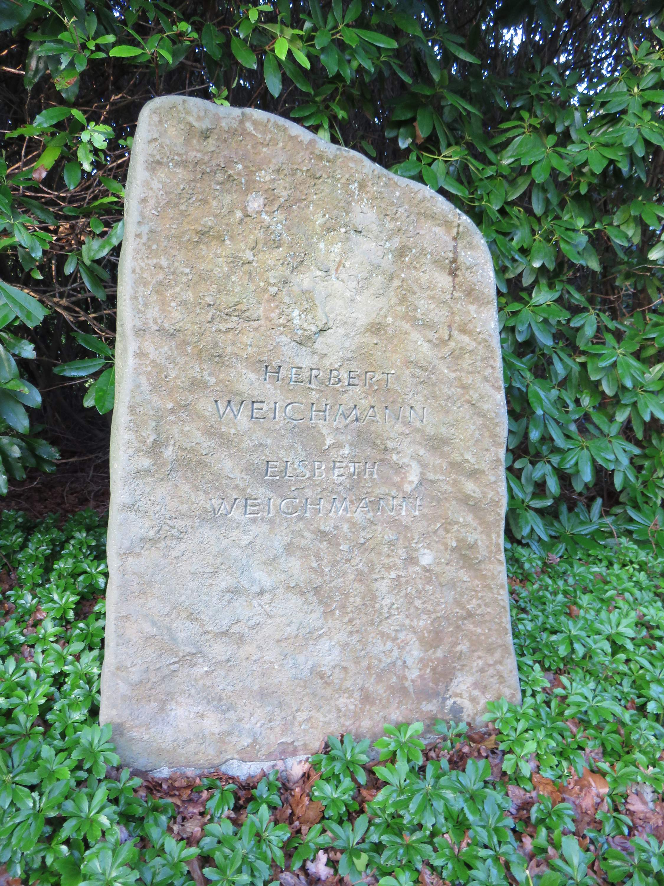 Grabmal für den deutschen Politiker und Hamburger Bürgermeister Herbert Weichmann und seine Ehefrau Elsbeth Weichmann auf dem Hamburger Friedhof Ohlsdorf, Lageplan: AA 15 nahe Nordteich und Waldstraße.